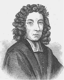 Benjamim Keach, 2º pastor do Tabernáculo Metropolitano